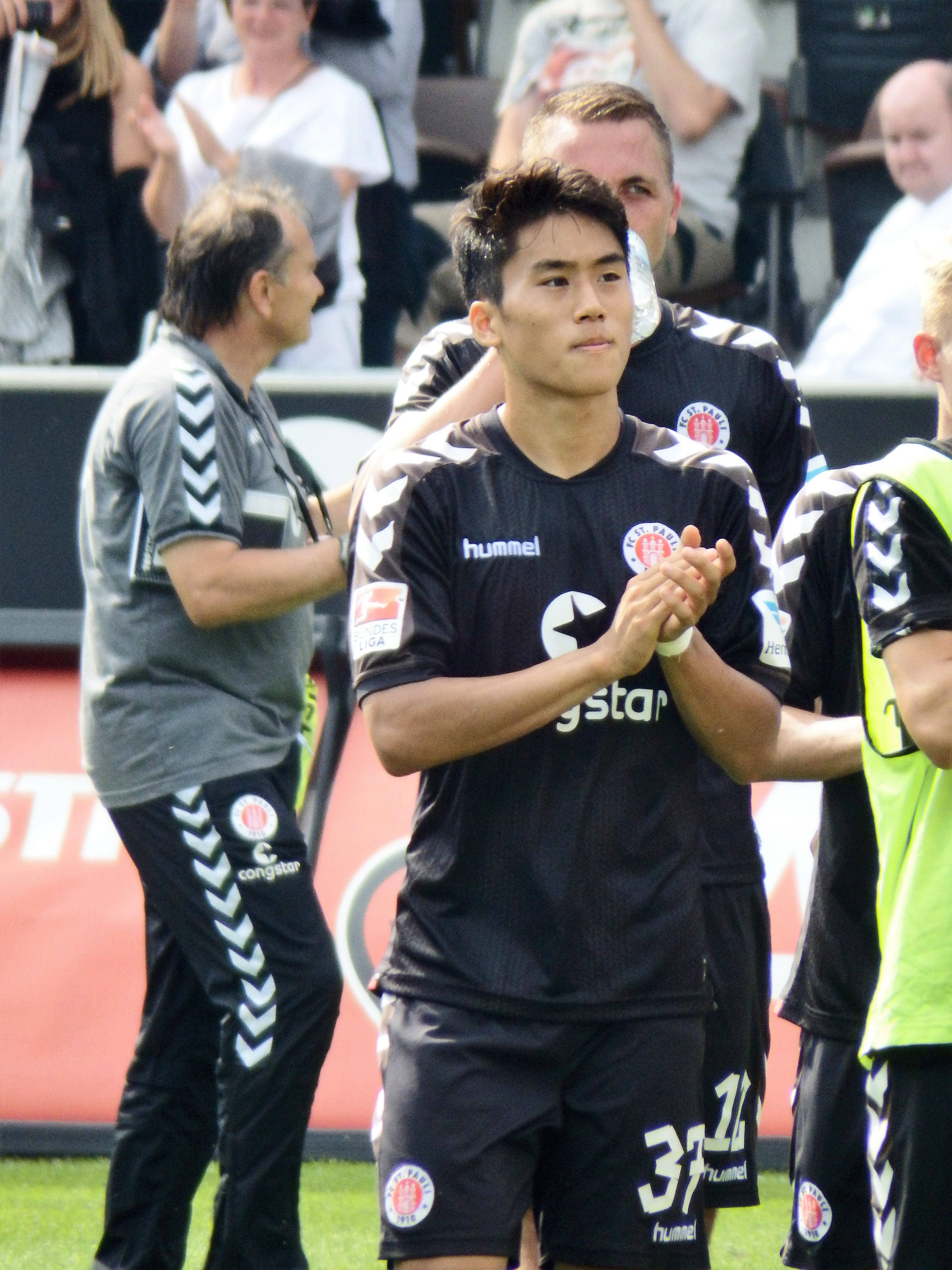 Kyoung-Rok Choi, FC St. Pauli